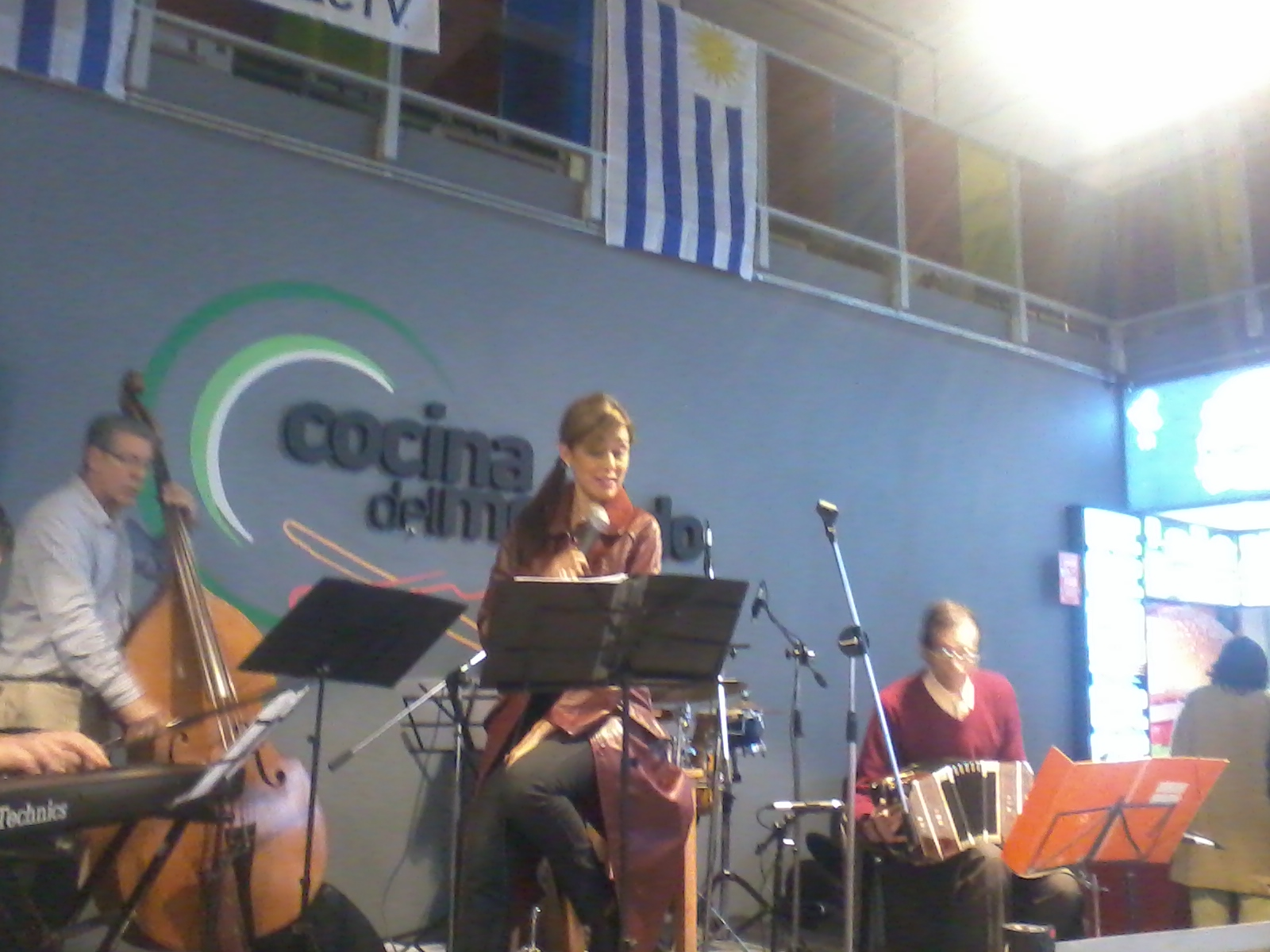 Valeria Lima, cantante y compositora uruguaya.